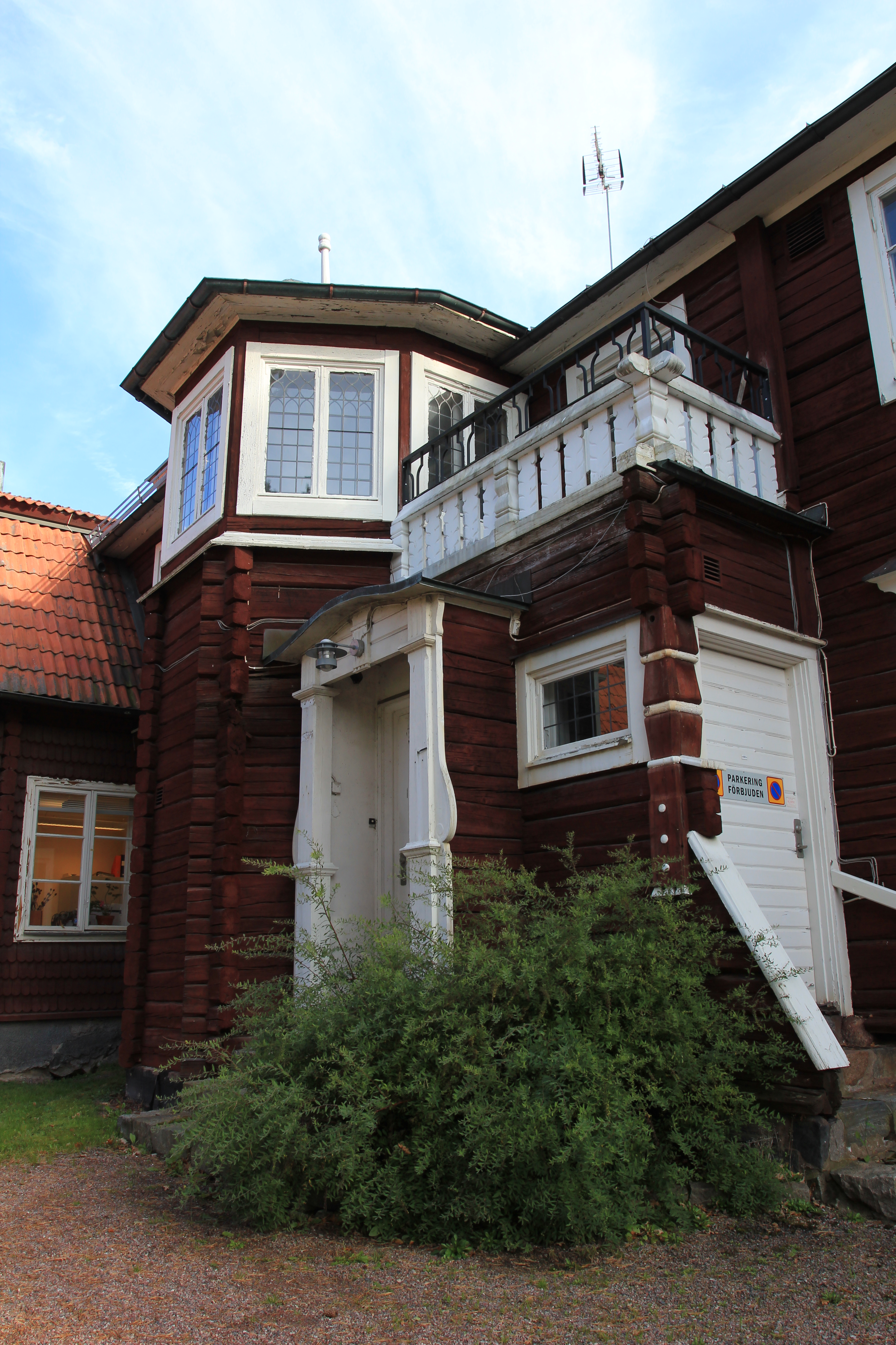 Gamla apoteket, Hedemora, Sverige